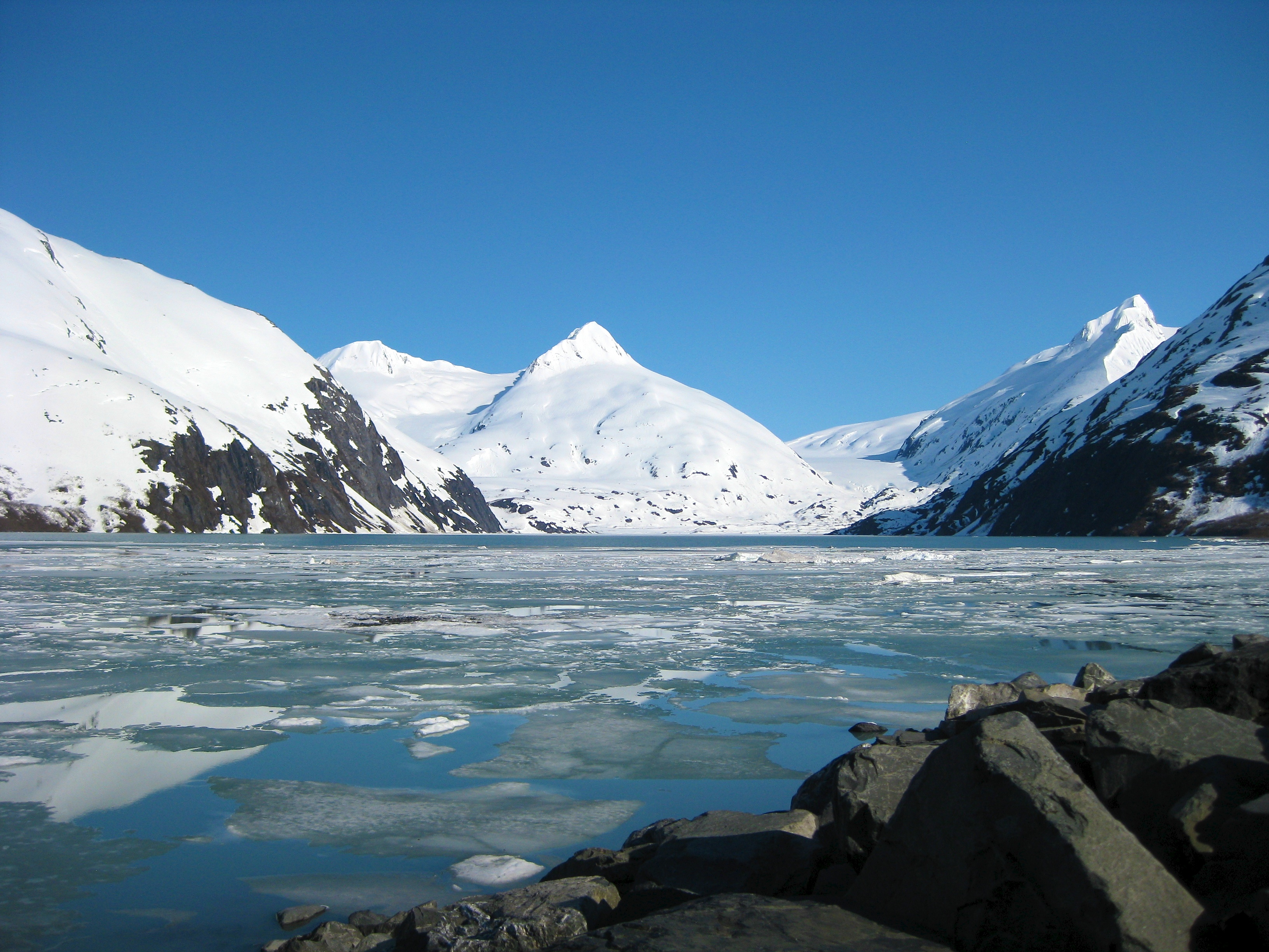 Portage Lake, Alaska